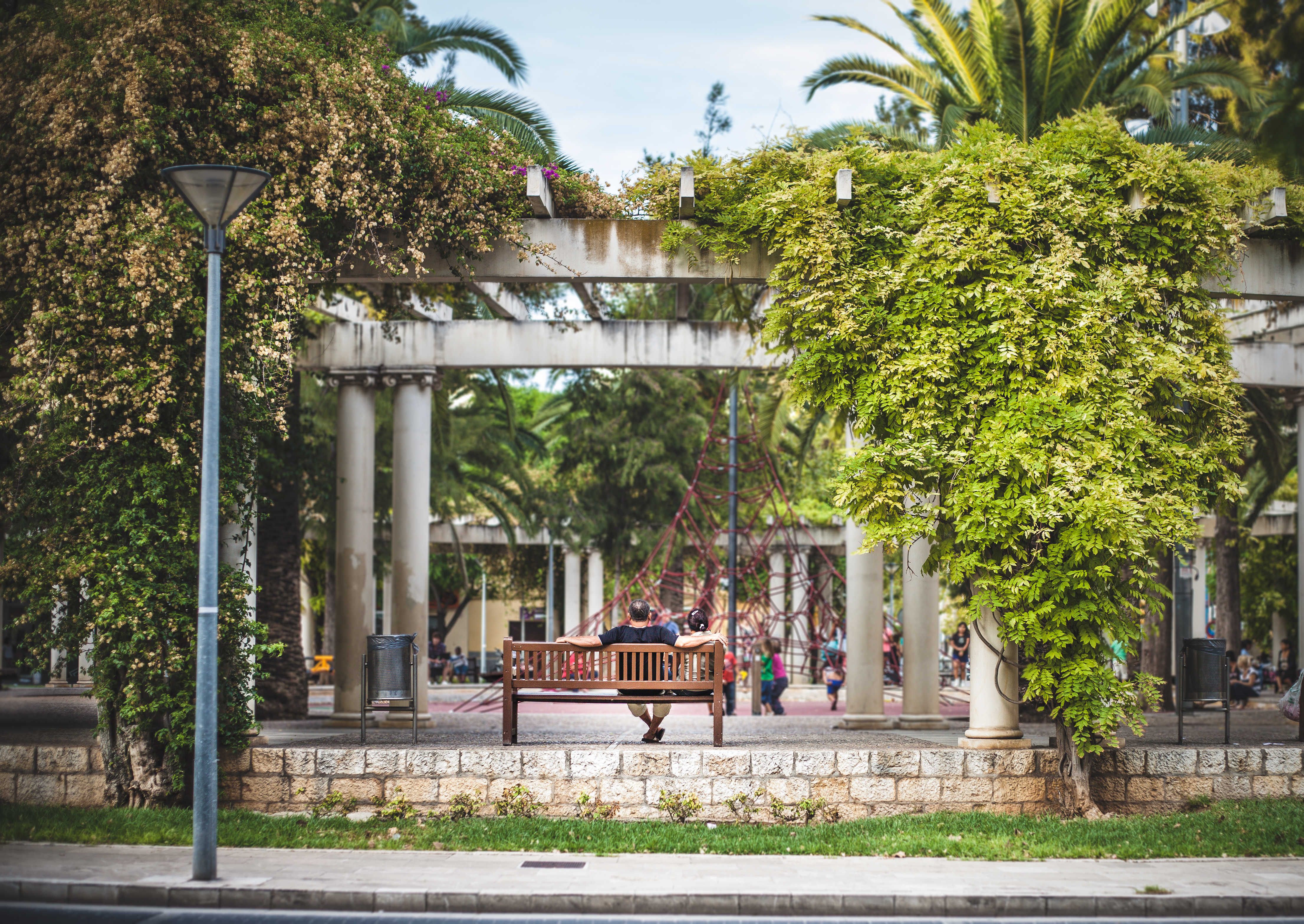 Llegué pronto a una cena con amigos, así que cogí la cámara y me fui a pasear po la zona. Aunque la zona no es la más bonita de Palma, me llamó la atención como los padres disfrutaban de su momento de tranqulidad alrededor los niños jugando.